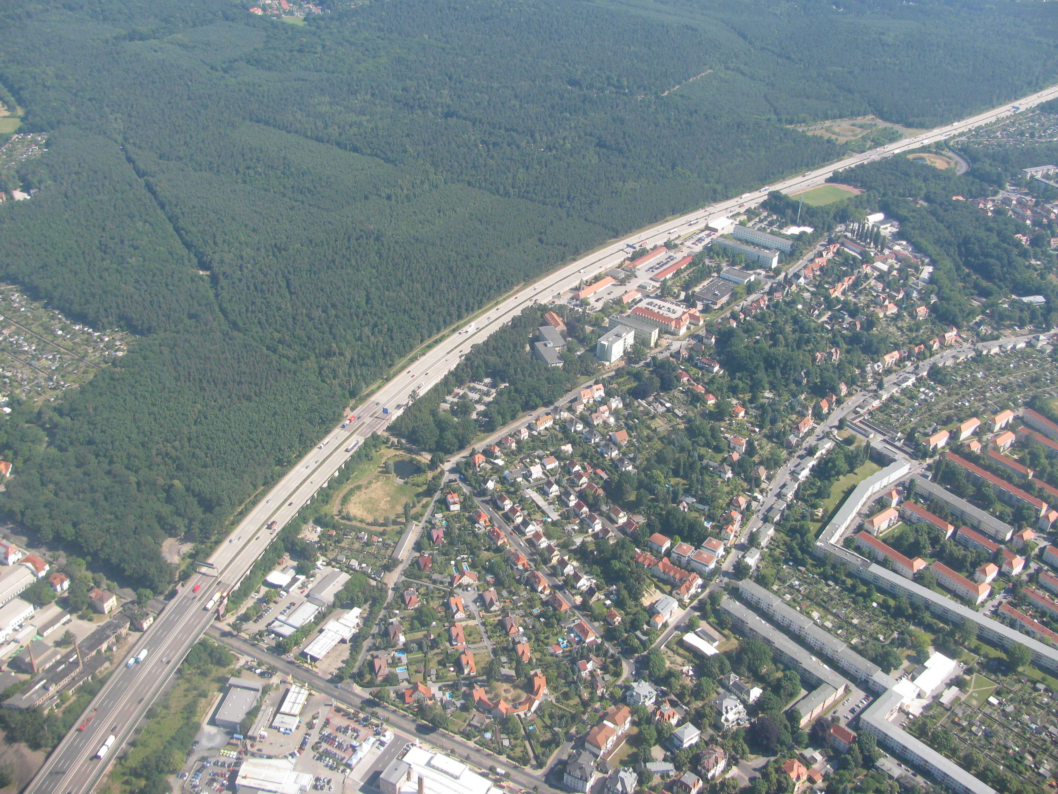 Luftbild Dresden-Trachau, Junge Heide